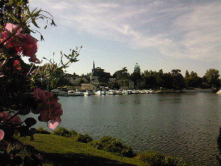 Commune de Grez-Neuville (Maine-et-Loire, France). Village de Neuville vu de celui de Grez : la Mayenne, le port et l'église.